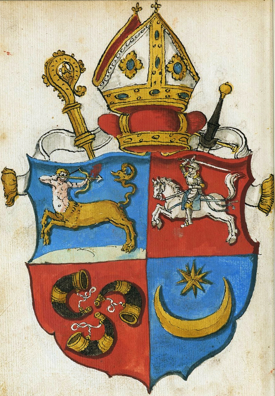 Беларуская (тарашкевіца): Герб Паўла Гальшанскага (Pavał Halšanski) з «Пагоняй» («Pahonia»)